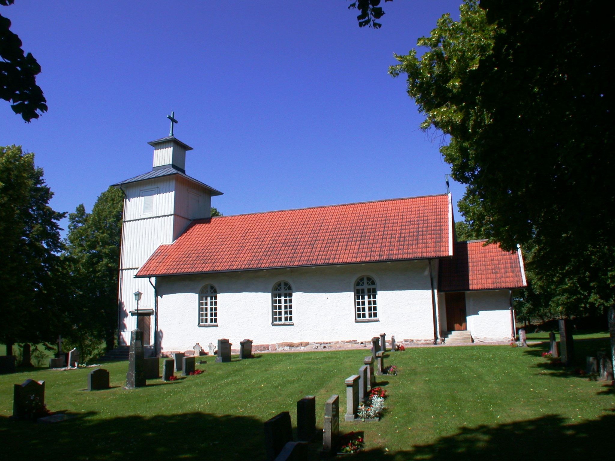 Färed chapel, Mariestad, Sweden